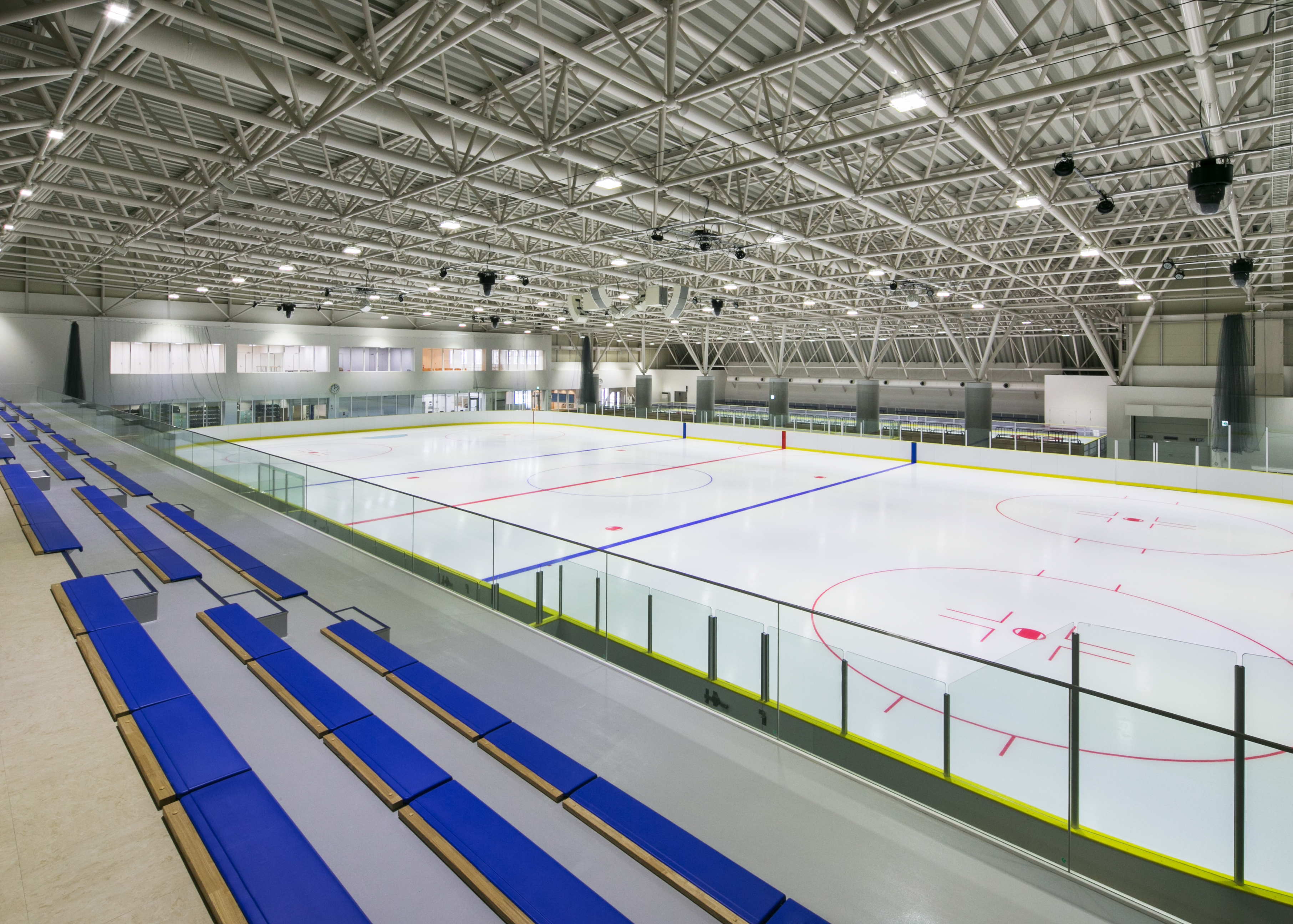 アイスアリーナ 新潟市中央区 2014年1撮影